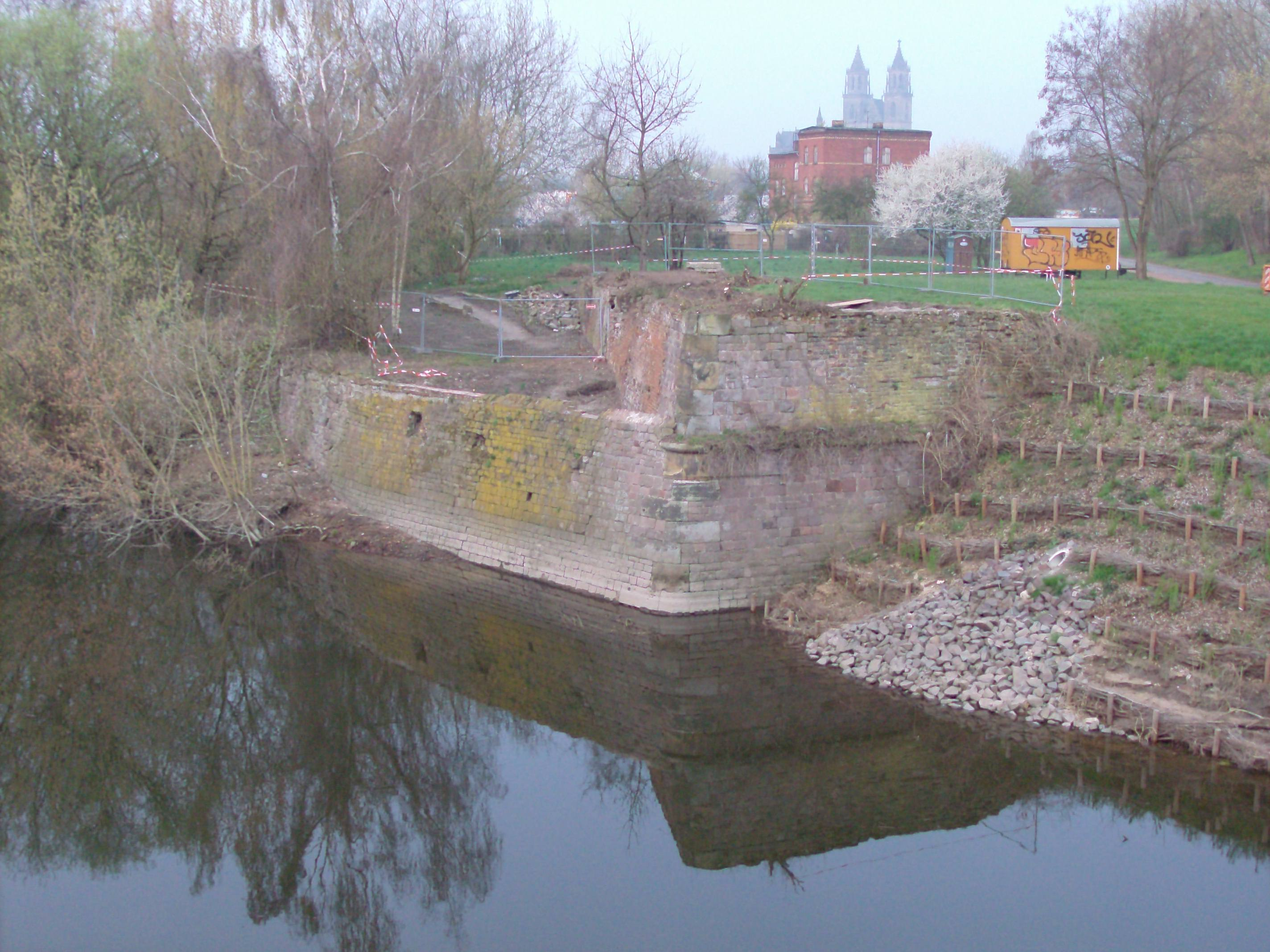 Beschreibung: Reste der Bastion Kronprinz der ehemaligen Zitadelle der Festung Magdeburg Quelle: Bild selbst erstellt Datum: 08. April 2009 Autor: C. J.